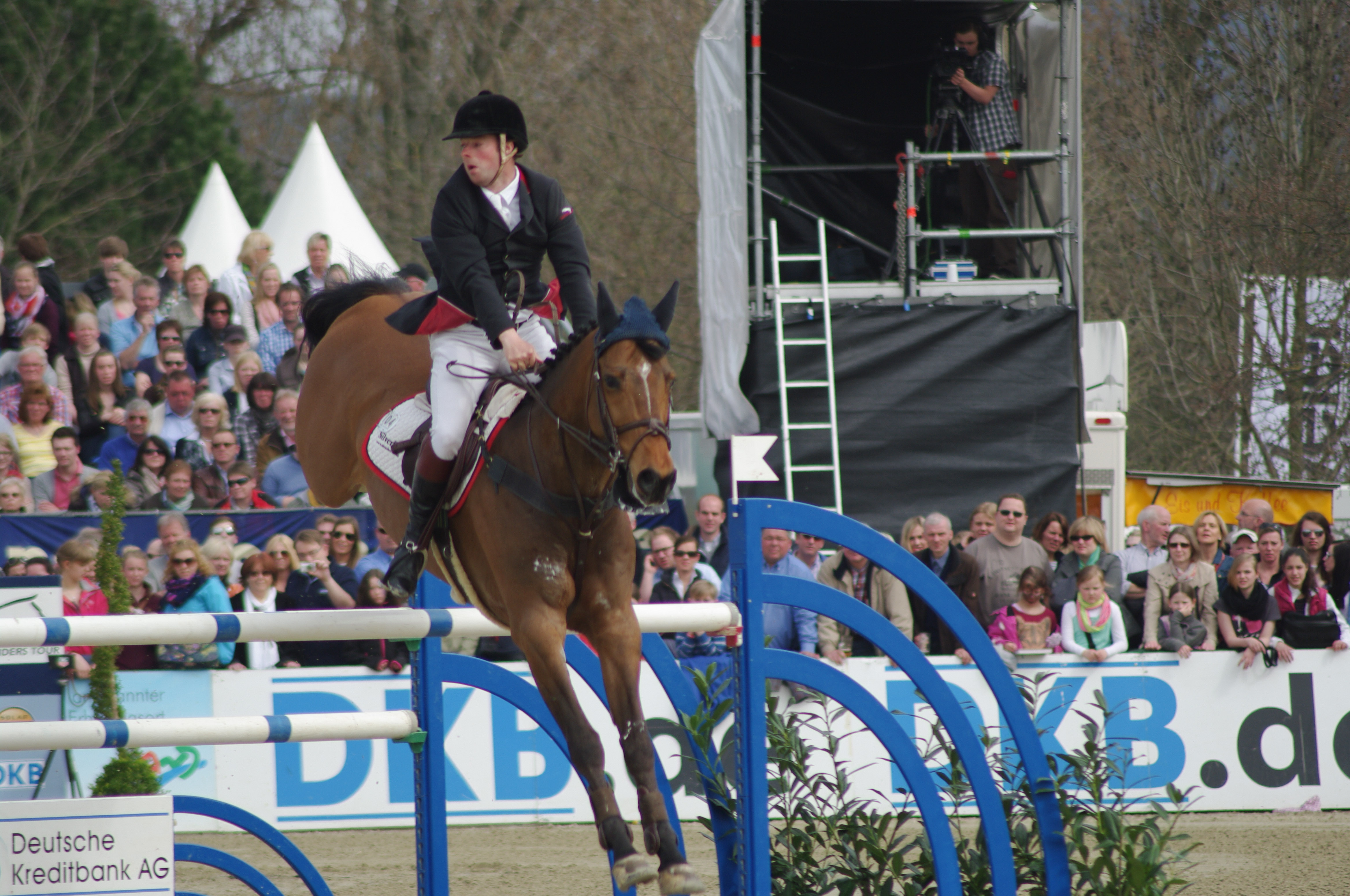 Horses & Dreams 2013: Robert Whitaker mit "Catwalk 14